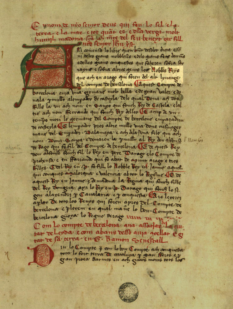 crònica de bernat desclot 1288